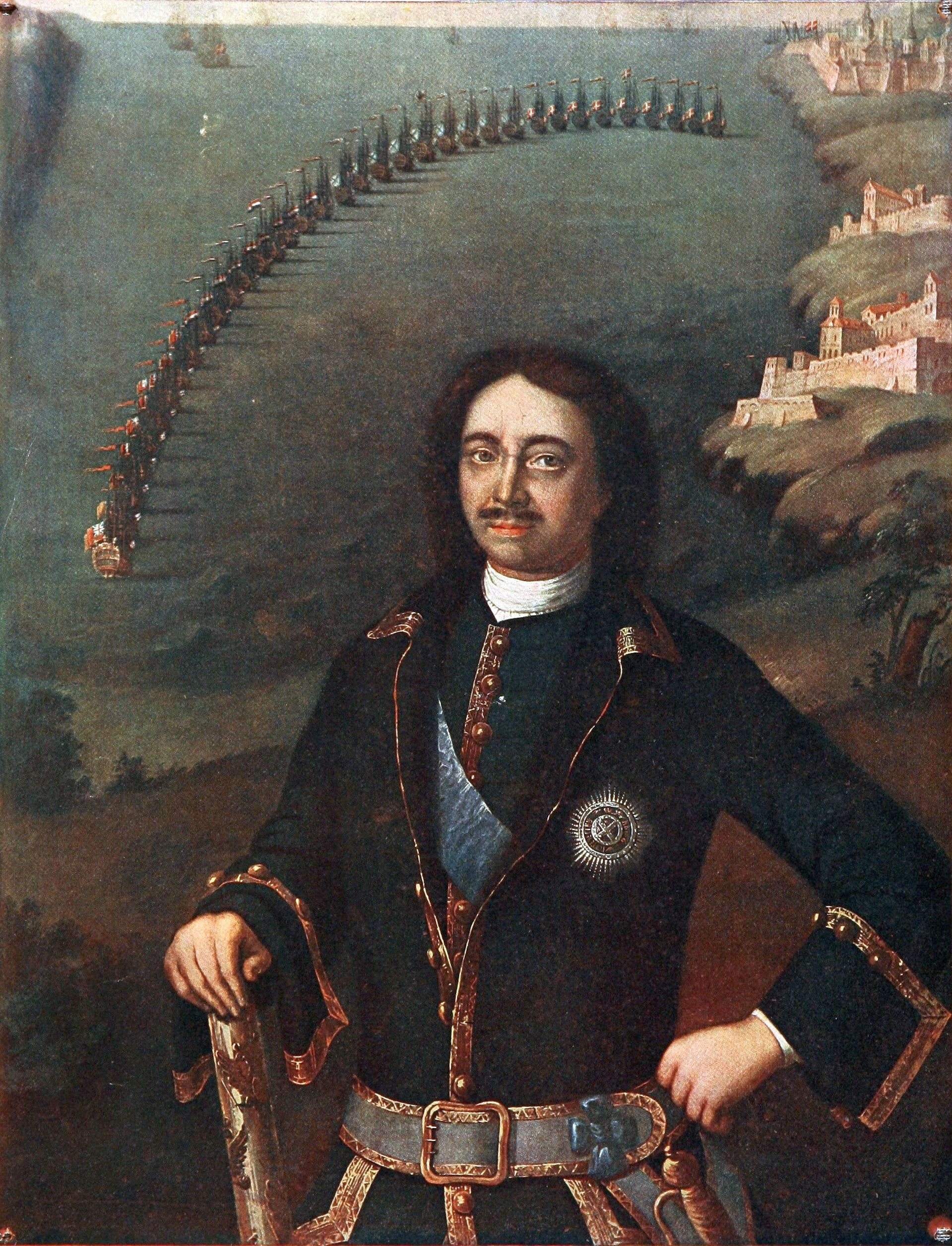 Каравак, Луи Портрет Петра I. 1716 (?) Центральный военно-морской музей Холст, масло. 142 х 105 Центральный военно-морской музей, Санкт-Петербург